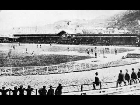 Lo stadio di Marassi di Genova durante la partita Genoa-Inter 1-2. Partita annullata e 2 a 0 a favore del Genoa per l'impiego da parte dell'Inter di un giocatore non regolarmente tesserato.